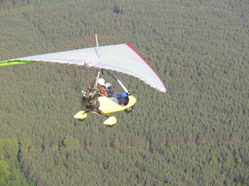 RWL2 (sausumos dvivietė) Motorizuota skraidyklė (trike-en)